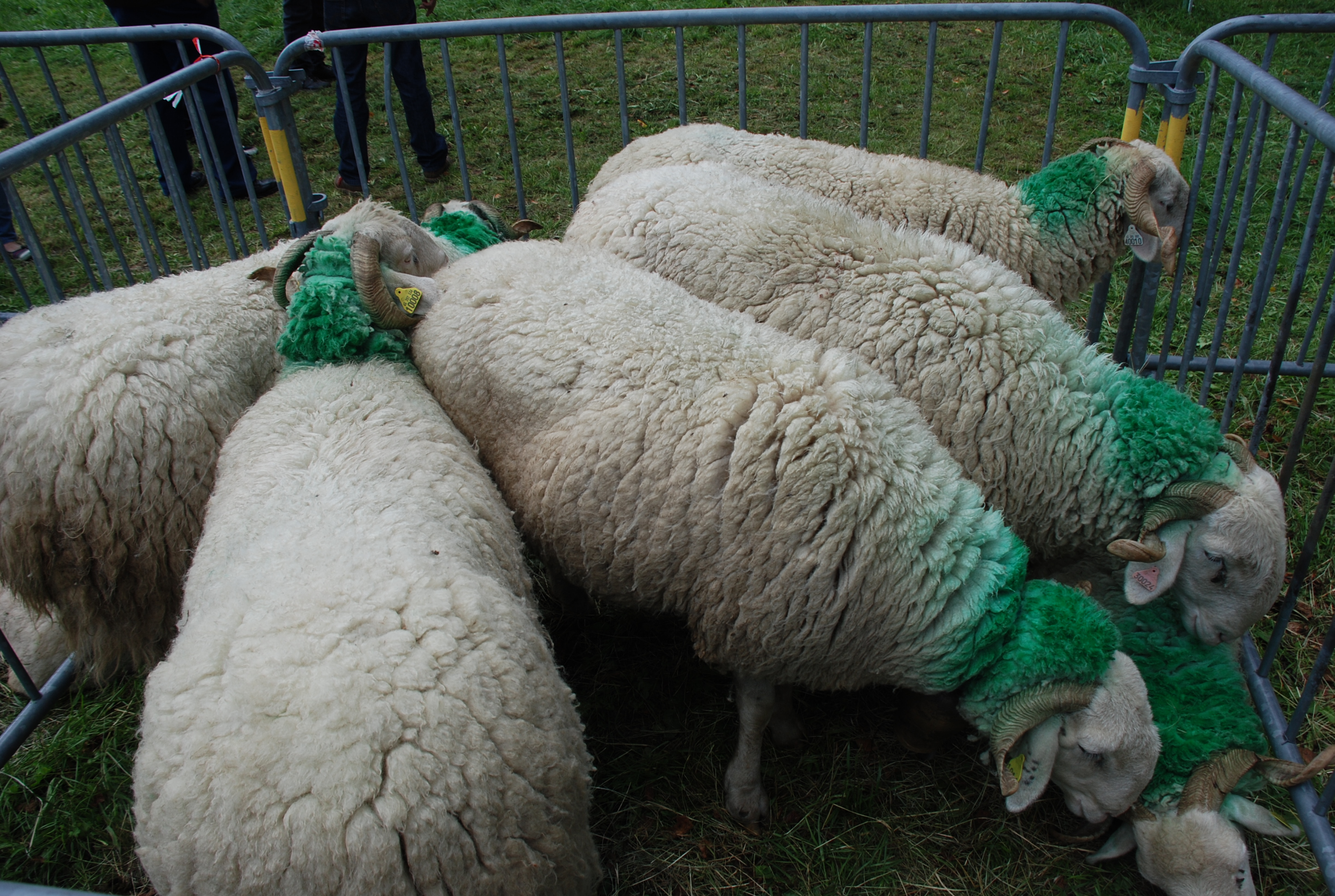 Sujets de la race ovine Lourdaise photographié le 06 septembre 2015 lors de la fête de la vache et de la brebis lourdaises à Aspin en Lavedan, Hautes-Pyrénées